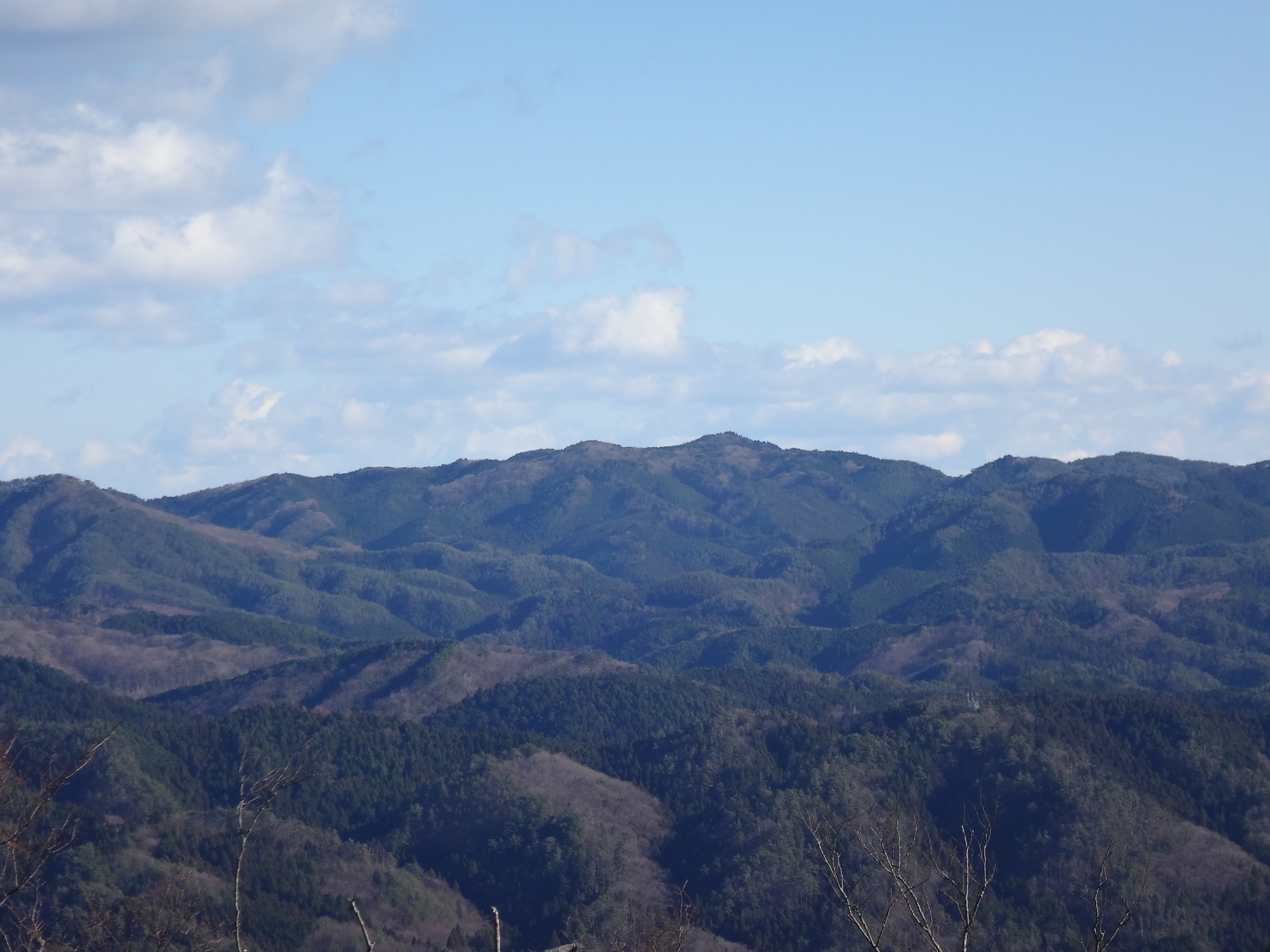 鍋足山から竪破山を望む